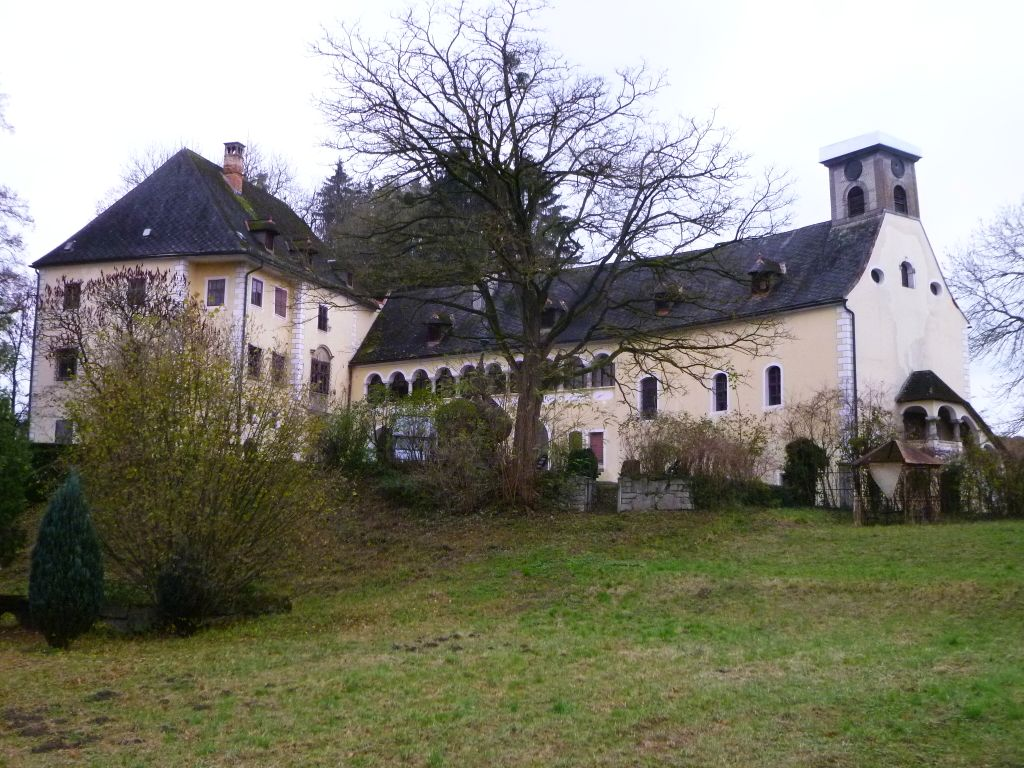 Schloss_Egendorf heute